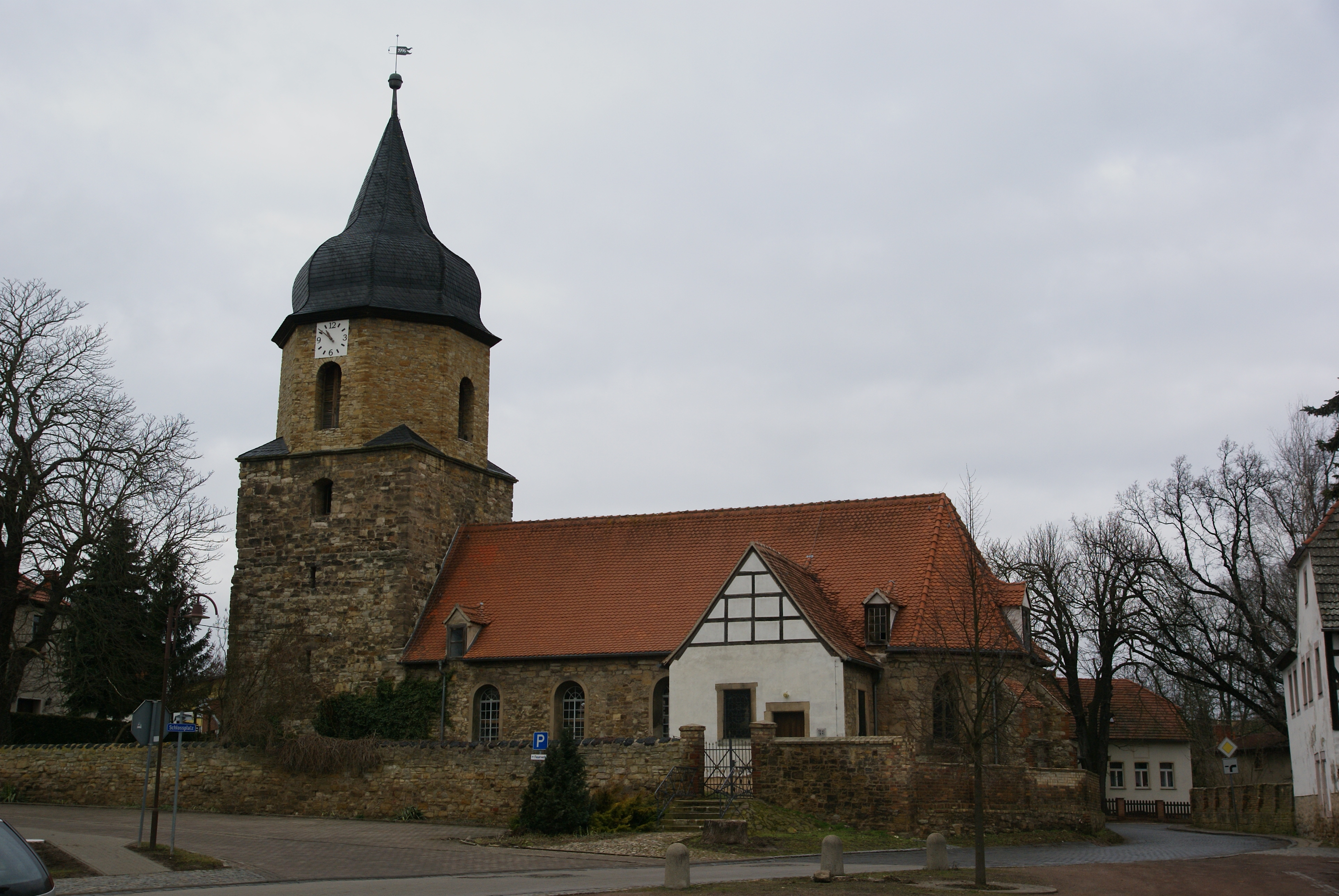 die Dorfkirche von Schochwitz